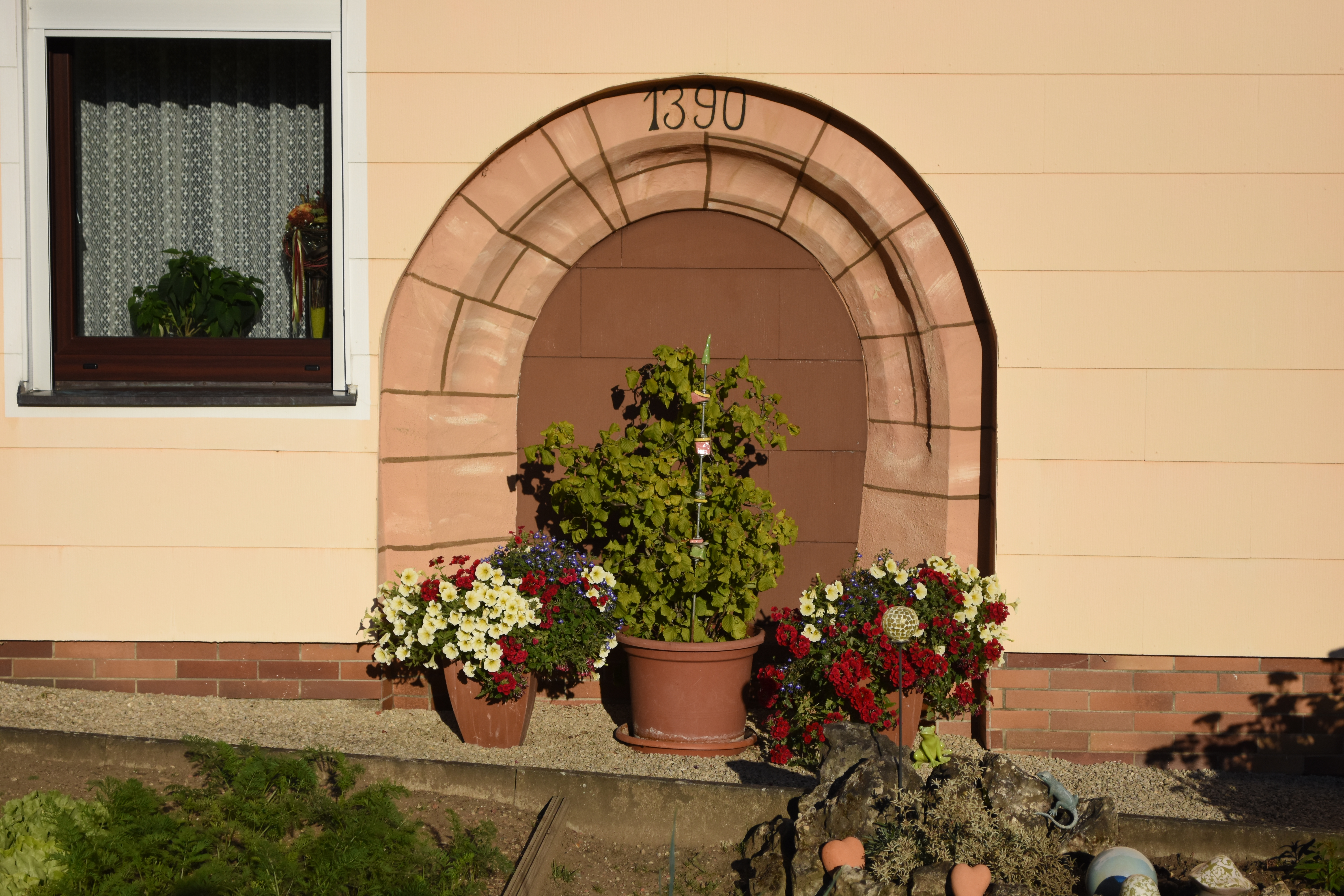 Sulzbach-Rosenberg-Umgebung, Siebeneichen 8: Rundbogenportal, romanisch, modern bezeichnet mit „1390“This is a photograph of an architectural monument.